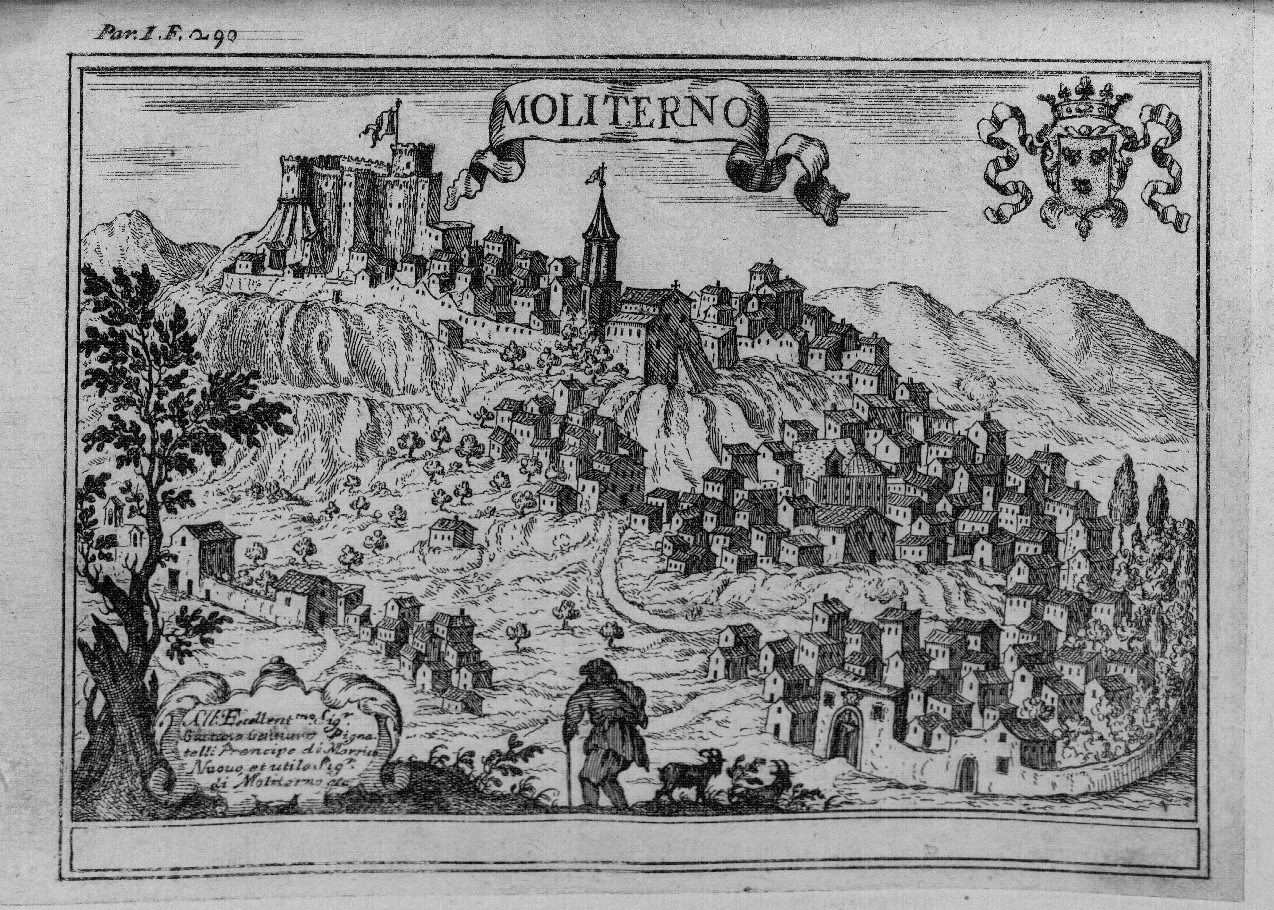 Autor: Pacichelli, Giovanni Battista, 1641-1702 Descripción bibliográfica: Il regno di Napoli in prospettiva : diviso in dodeci provincie, in cui si descrivono la sua Metropoli Fidelissima città di Napoli ... Opera postuma divisa in tre parti / dell'abatte Gio. Battista Pacichelli ; Parte prima [-terza] ... Del regno di Napoli in prospettiva / dell'abate Pacichelli. Parte prima. - In Napoli : nella Stamperia di Michele Luigi Mutio, 1703. - v. : principalmente il.; 4º . - Inic. adorn. y frisos dec. - Grab. calc. y h. pleg. grab. calc. de mapas de Cassianus de Silva. Ilustrador: Cassiano De Silva, Francesco, il. Impresor: Muzio, Michele Luigi, imp. Lugar de impresión: Italia. Nápoles Localización: Vea la ilustración en su contexto